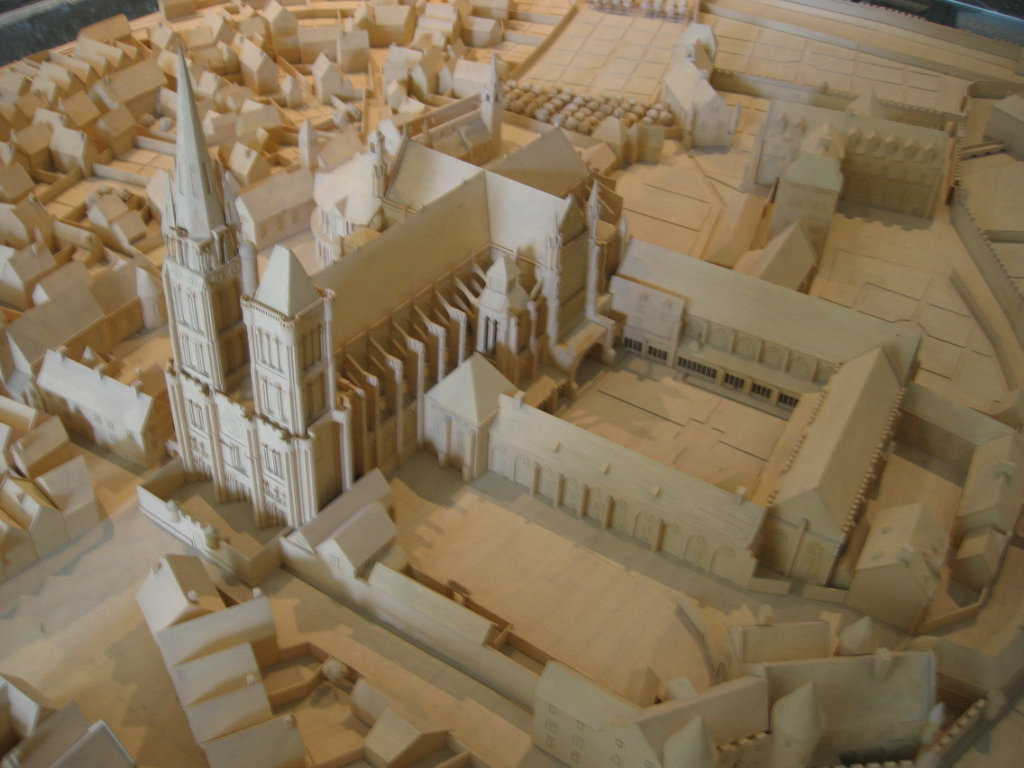 Basilique Saint-Denis de Saint-Denis au nord de Paris